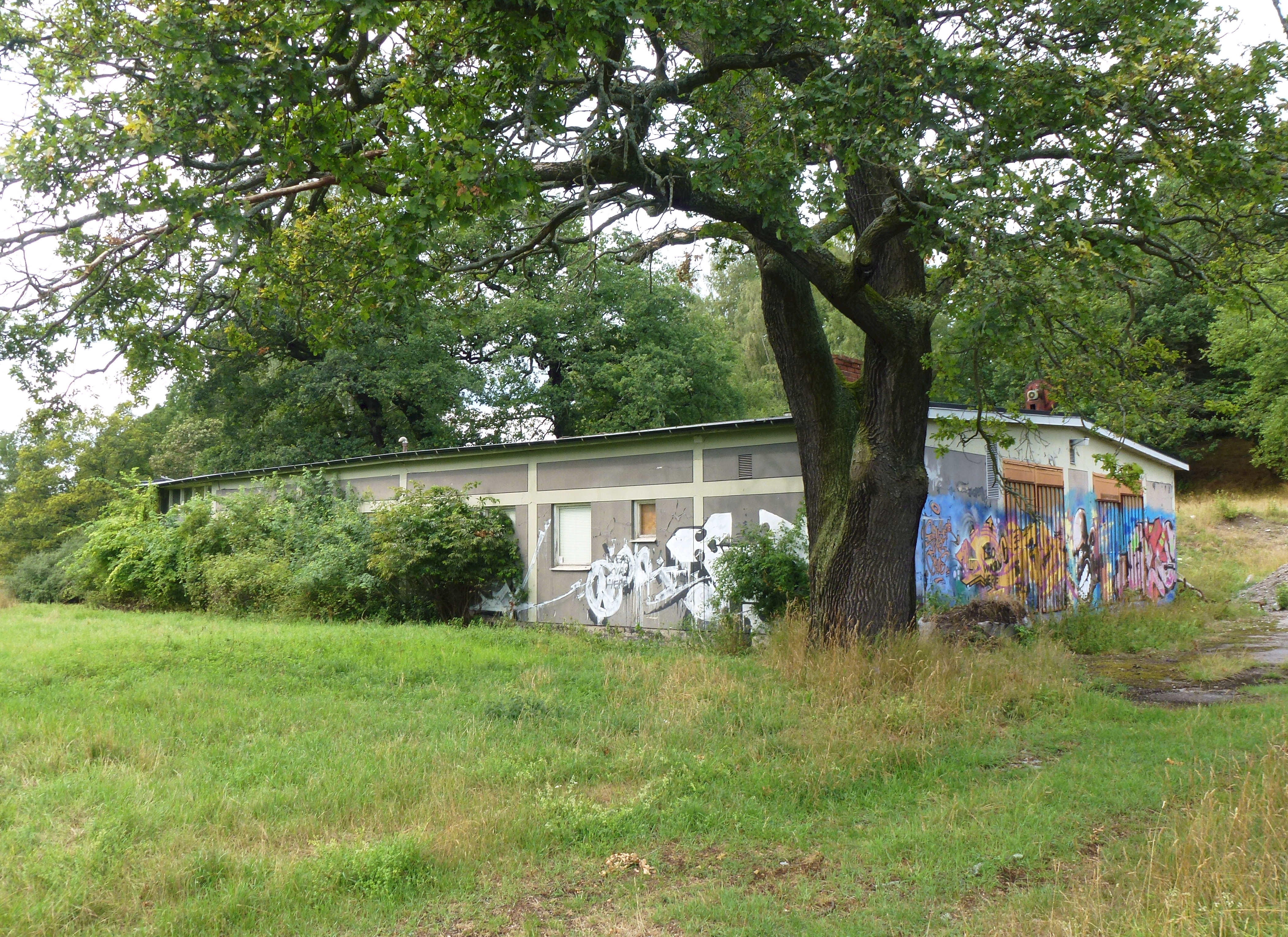 En rest av Fisksjöängs tidigare industriområde